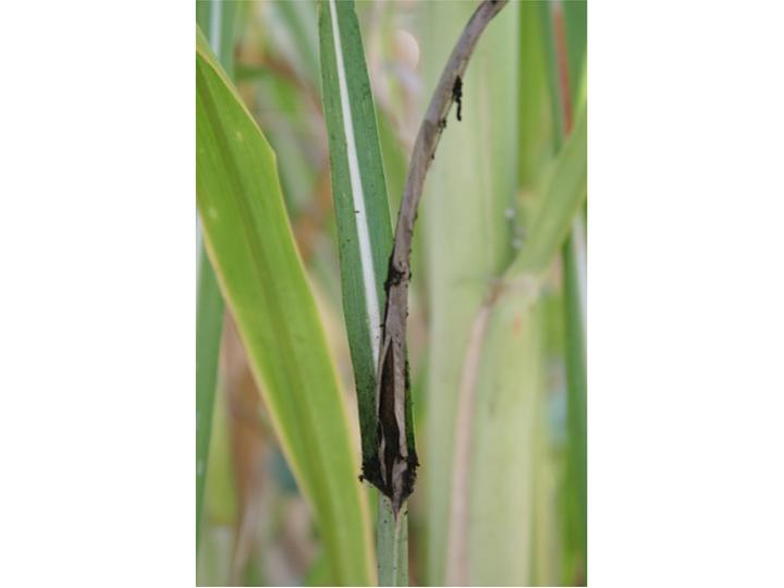 Symptômes (sore charbonneux incurvé en forme de fouet) du charbon de la canne à sucre (Saccharum_officinarum) dus à Ustilago scitaminea (syn. Sporisorium scitamineum).